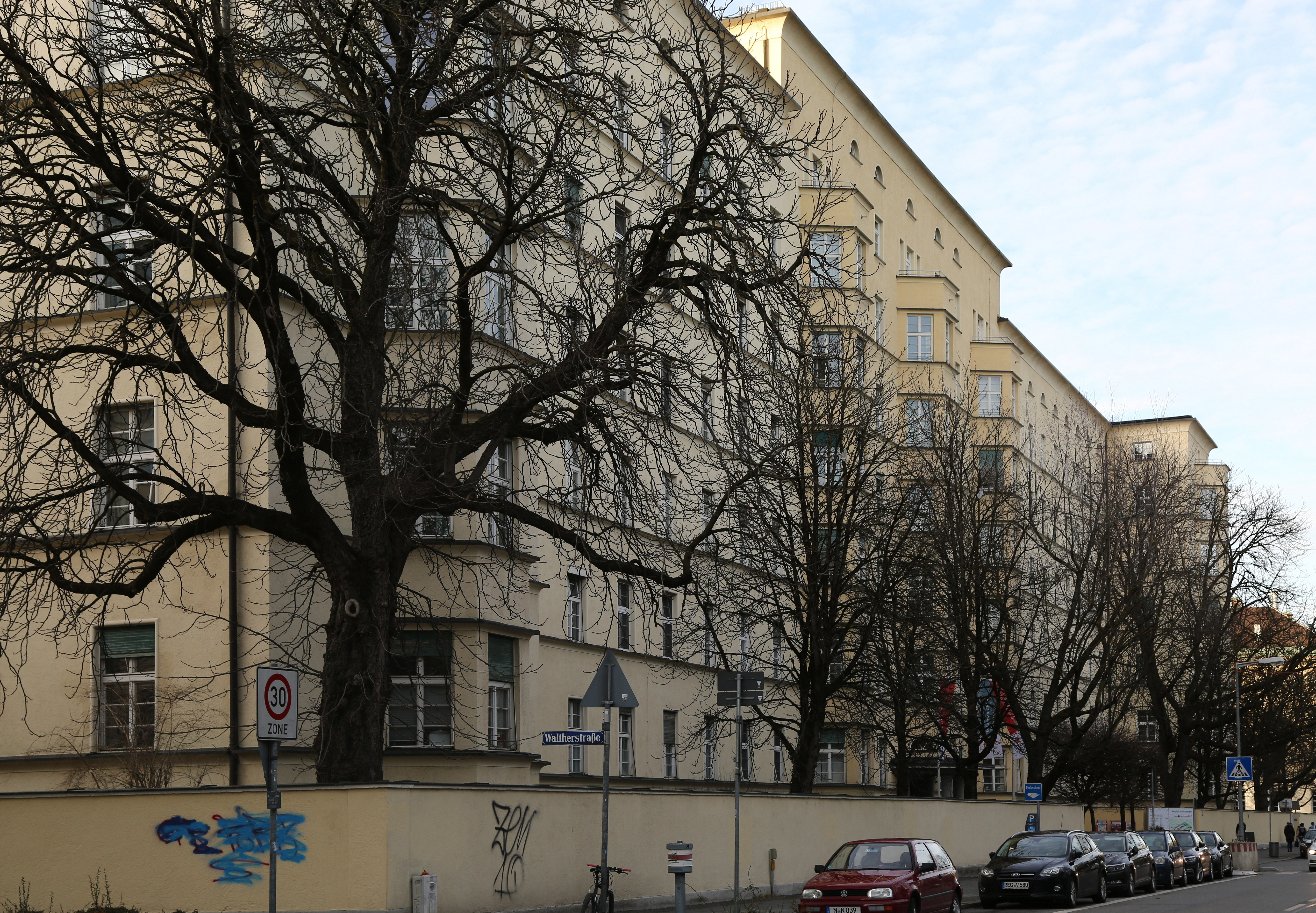 Krankenhaus Thalkichner Straße des Klinikums München.